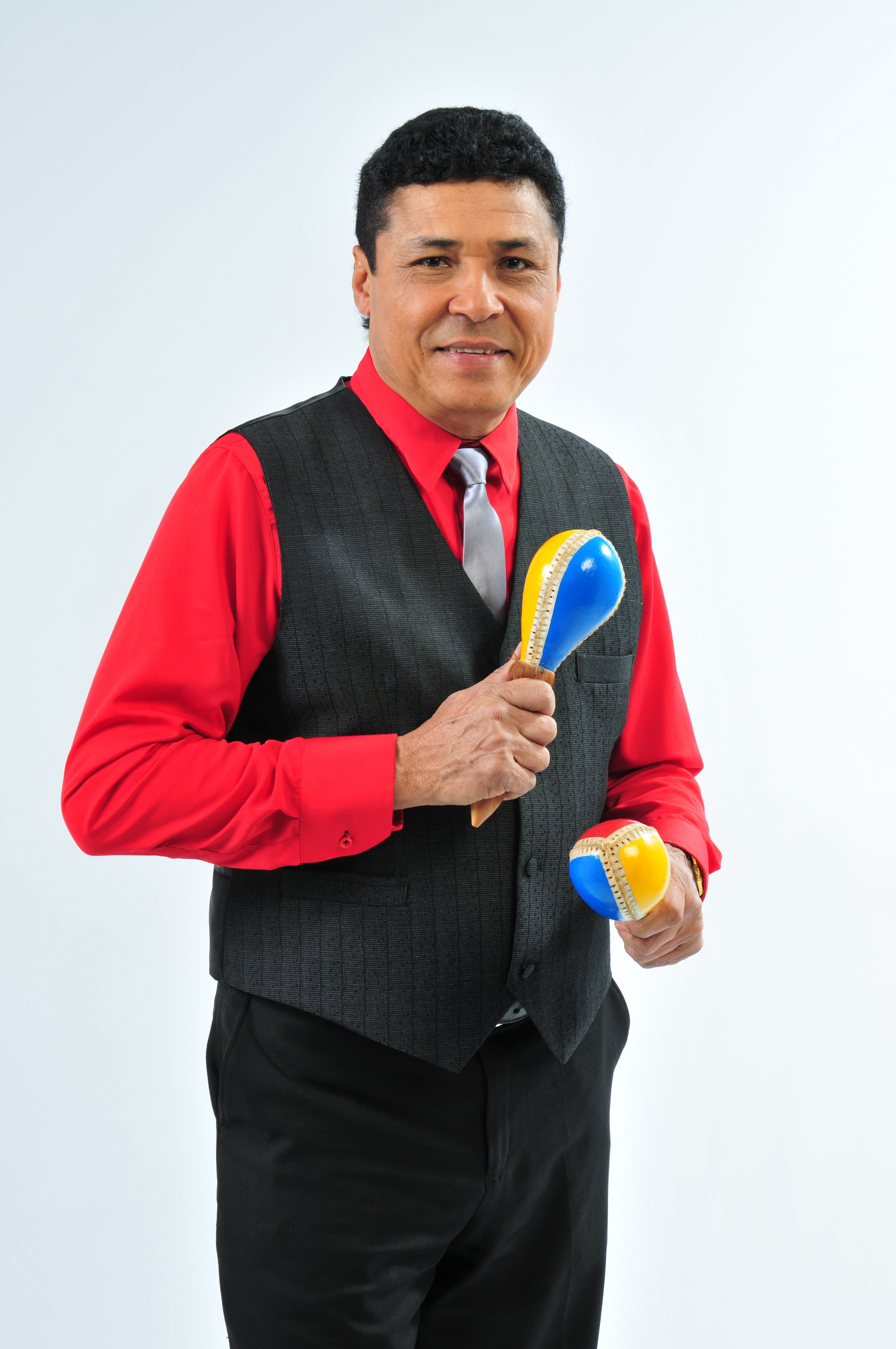 Eddie Gutierrez, Director y propietario de la Sonora Malecon